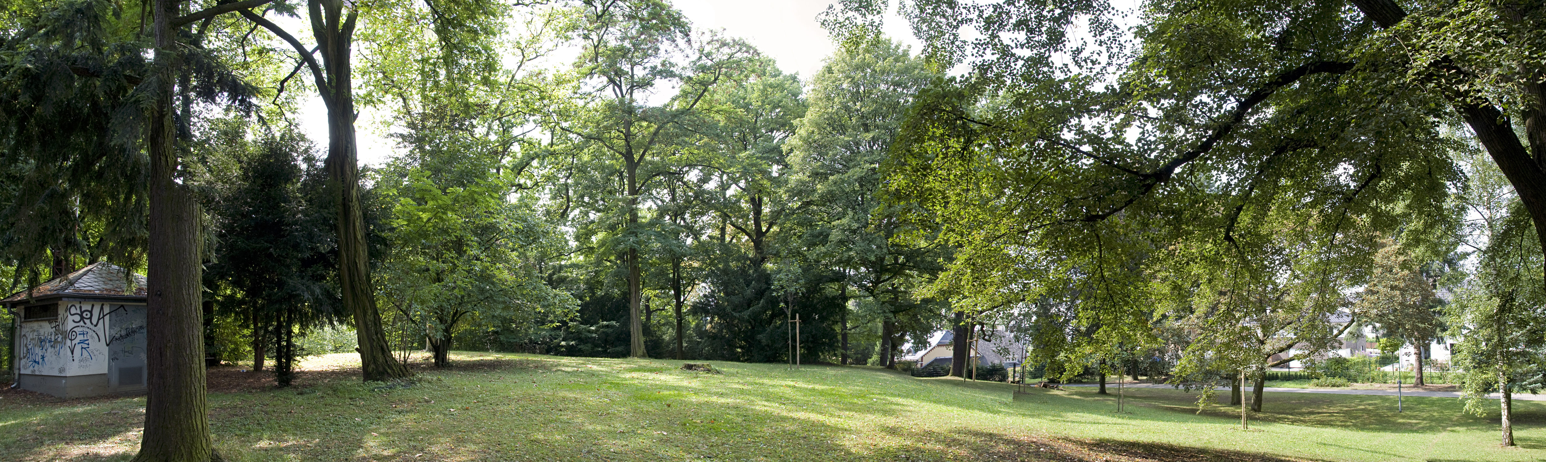 Wasserpark Frankfurt am Main Panoramablick von Osten über den Hochbehälter